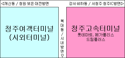 가경터미널의 위치 비교